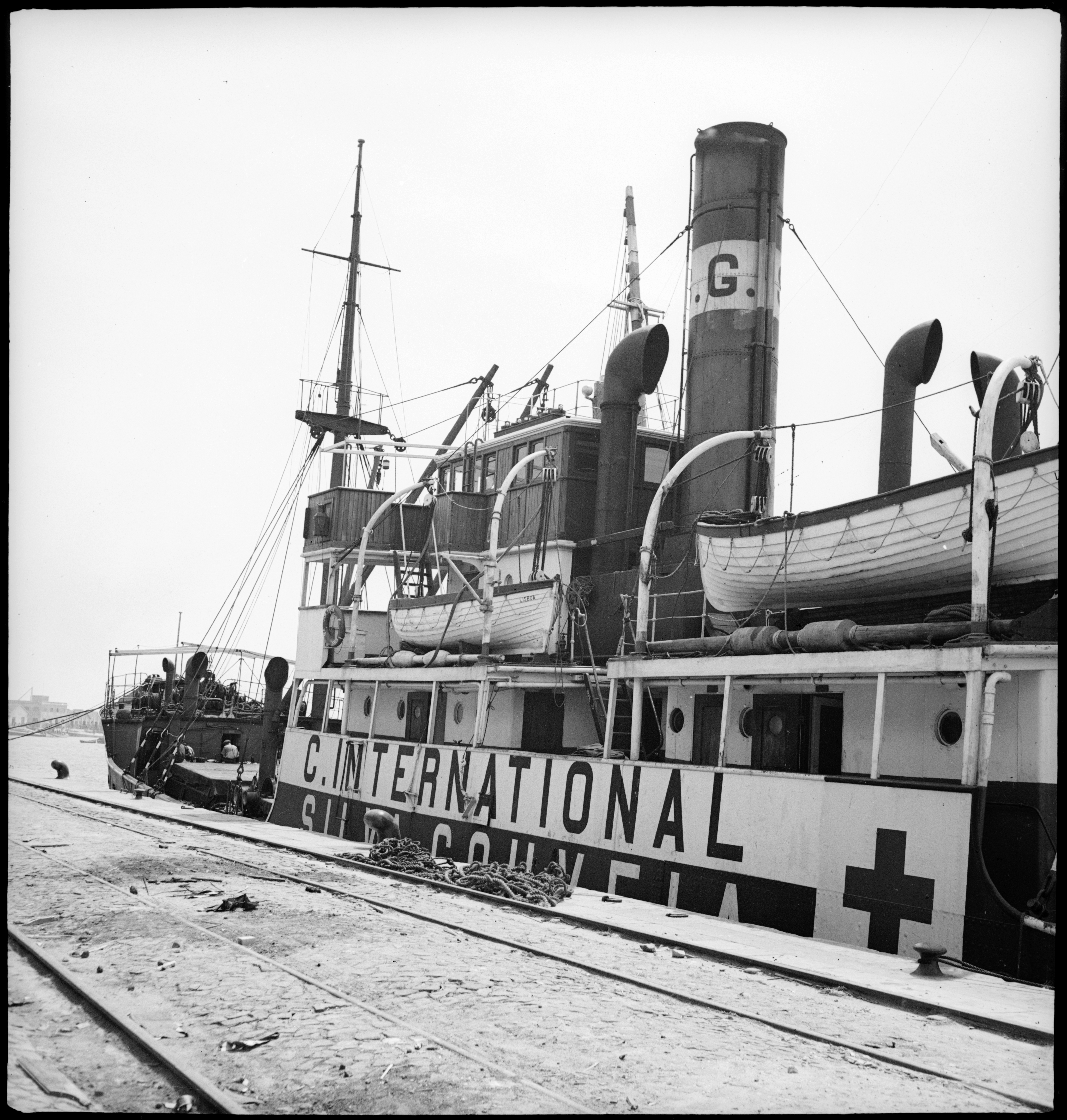 Portugal, Lissabon (Lisboa): Schiff Silva Gouveia; Blick auf ein Schiff, dass die Flagge des Roten Kreuzes trägt